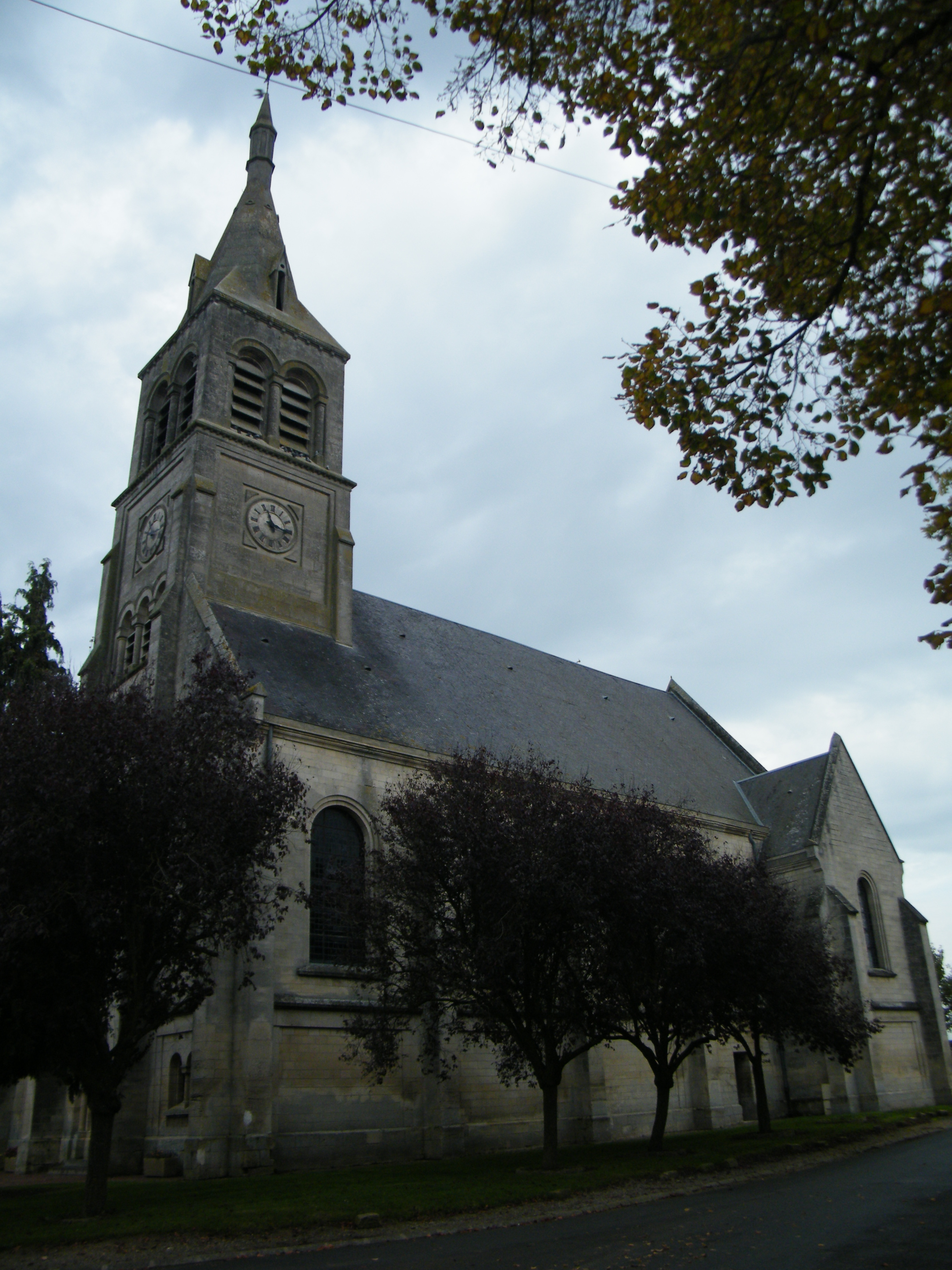 église.